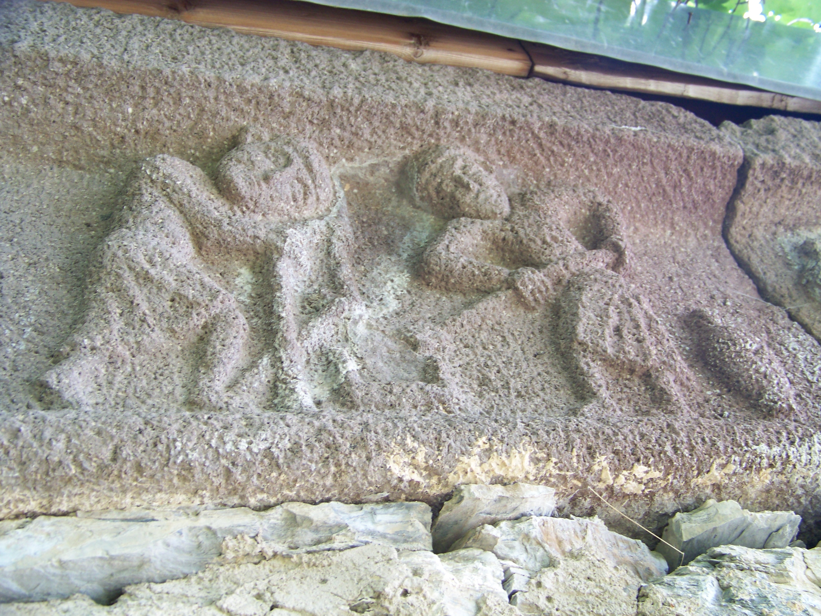 ღვთისმშობლის დარბაზული ეკლესია